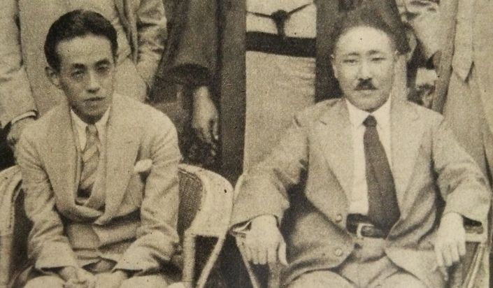 西條八十（左）と中山晋平（右）。1931年熱海にて。